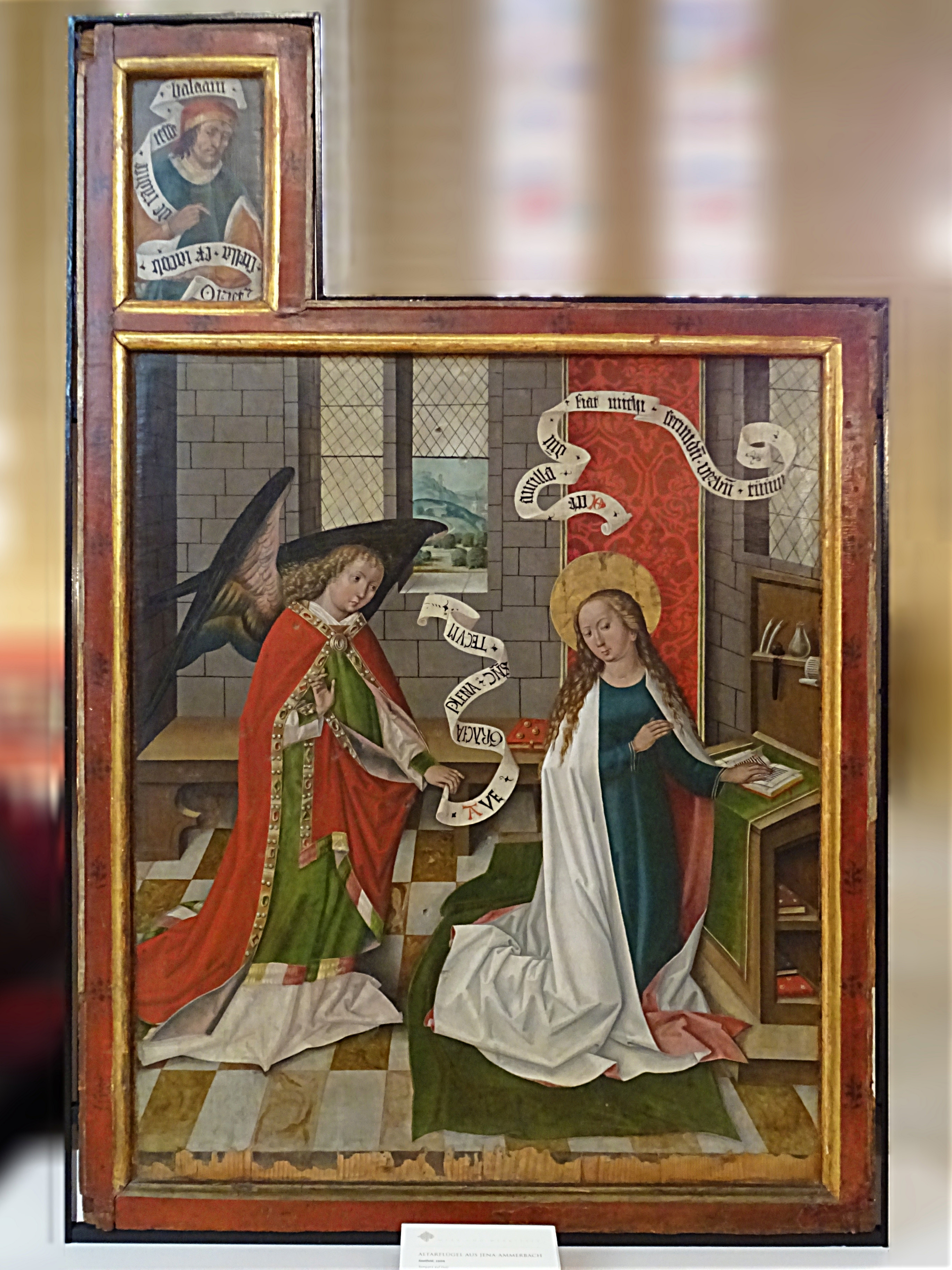 Vierflügeliger Schnitzaltar von 1504 aus Saalfelder Schule der Dorfkirche Ammerbach. Der linke äußere Seitenflügel zeigt bei geschlossenen Innenflügeln die Ankündigung der Geburt Jesu durch den Engel Gabriel an Maria. In der Ecküberhöhung links die Botschaft des Balaam. Das Original befindet sich zur Zeit in der Marienkirche Mühlhausen.